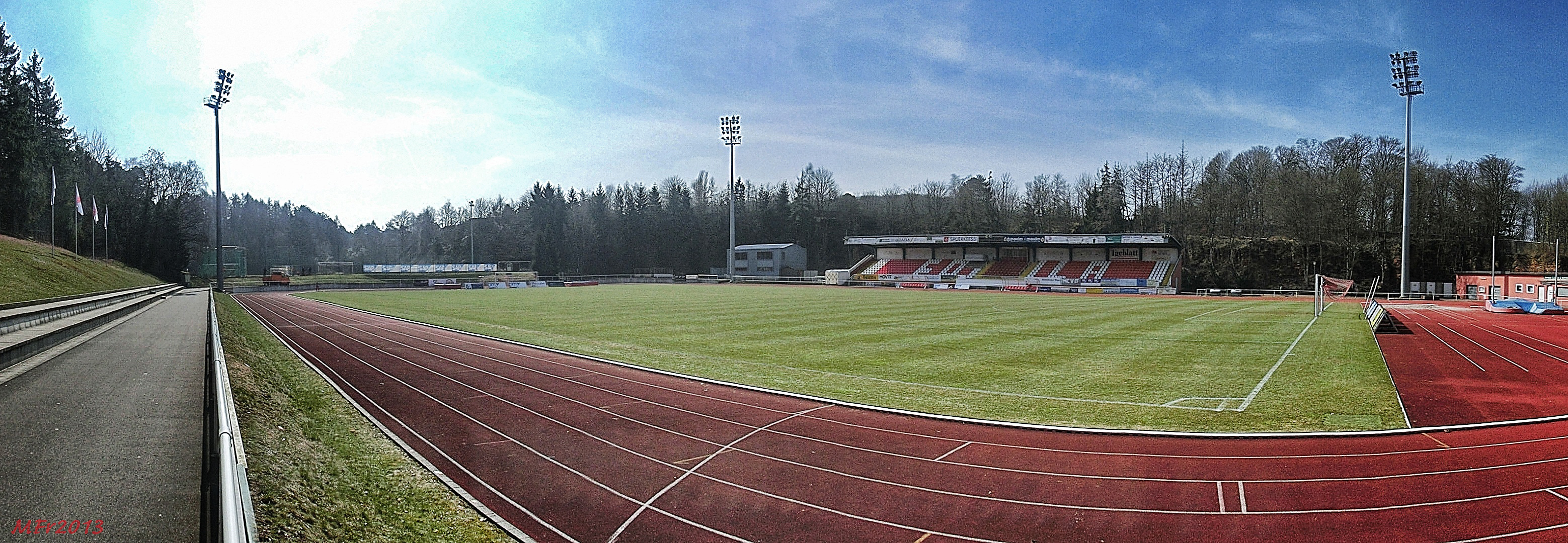 Das Stade Emile Mayrisch ist die Heimat des luxemburgischen Traditionsvereins CS Fola Esch